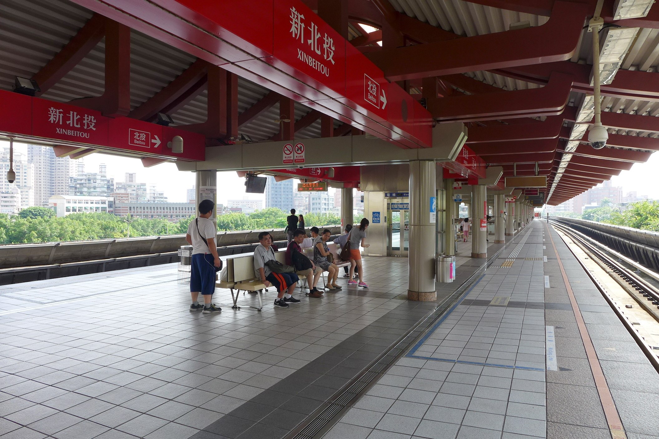 Xinbeitou 新北投站